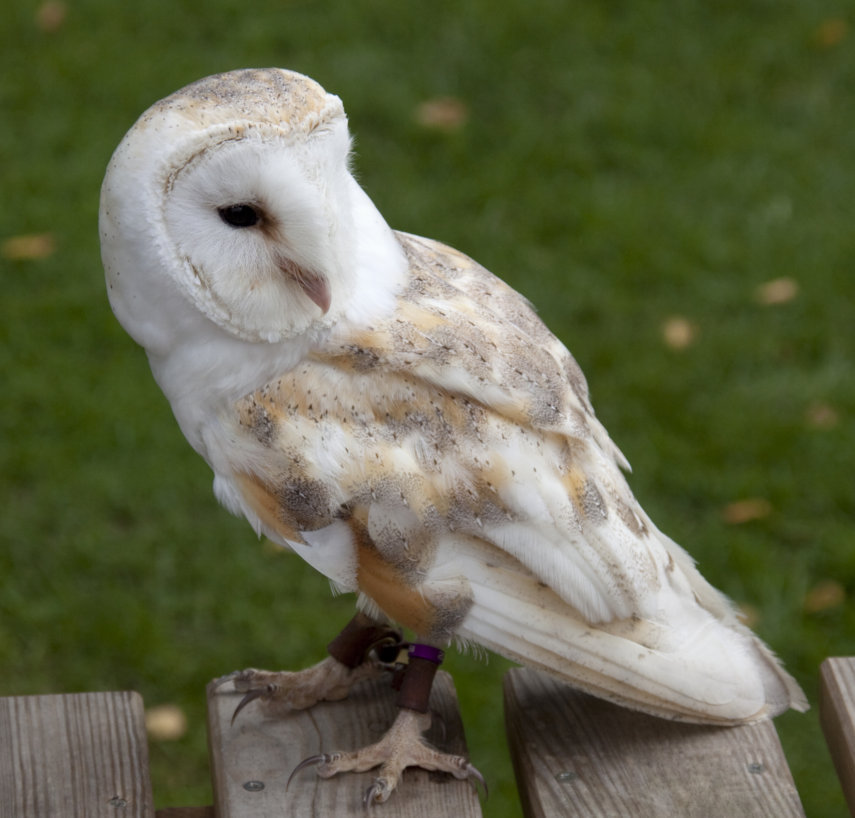 Barn Owl6